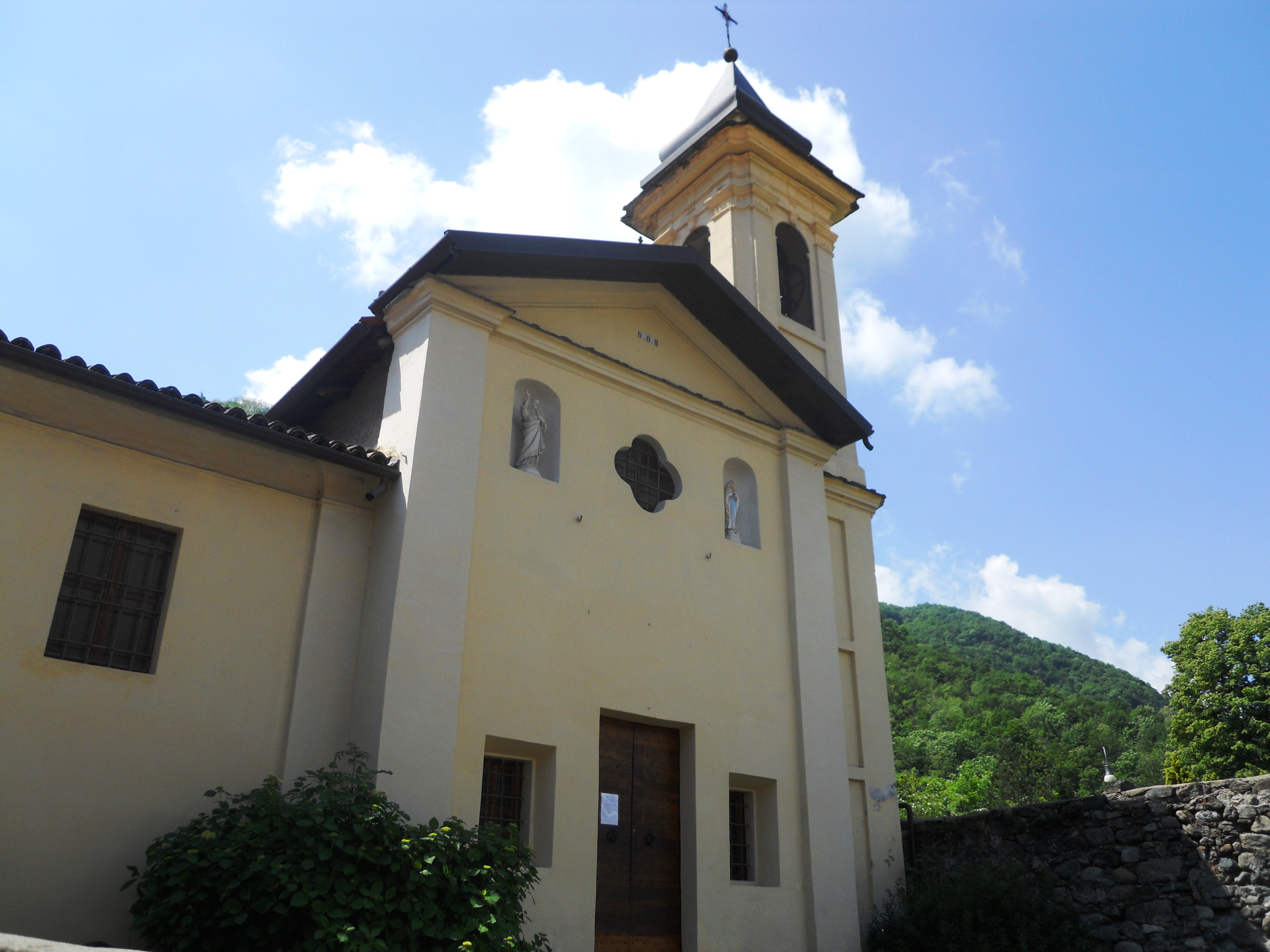 Facciata dell'oratorio di S.Matteo